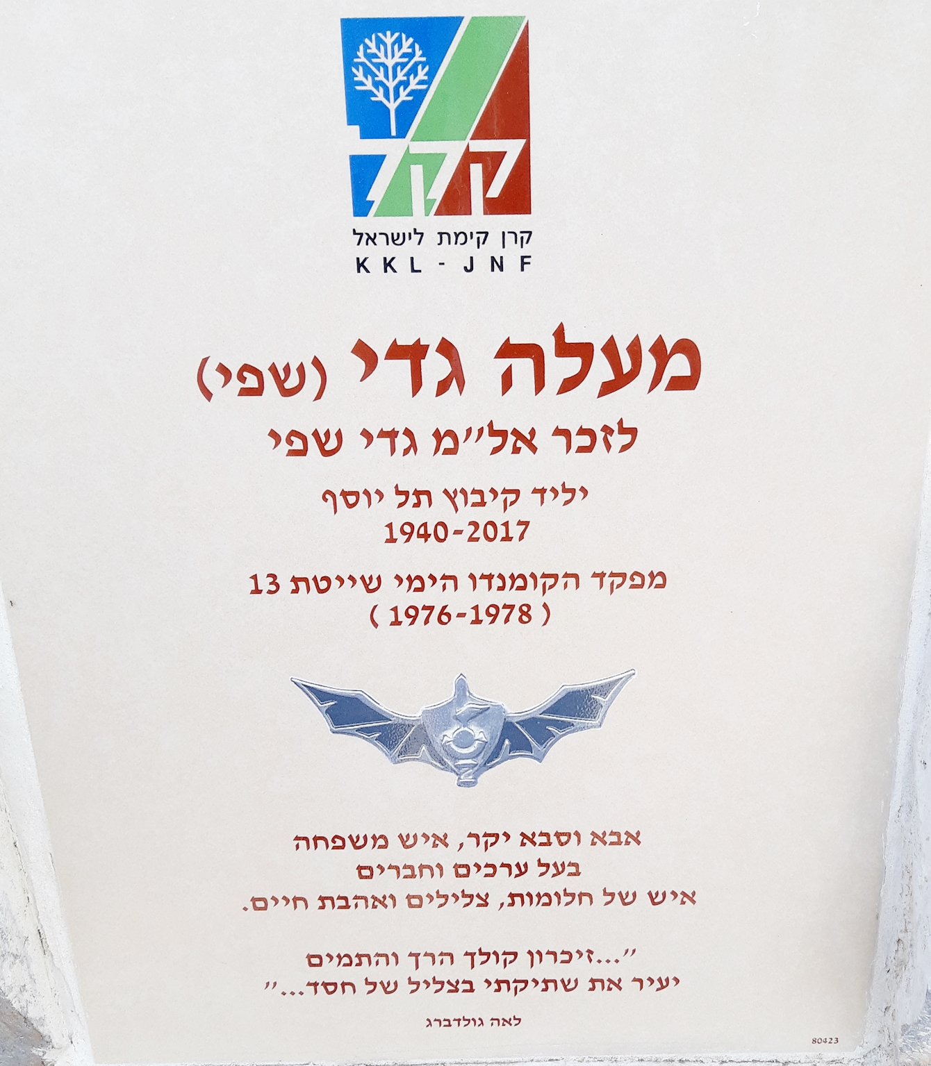 שלט מצפור "מעלה גדי" ביער עופר שנחנך באוקטובר 2019